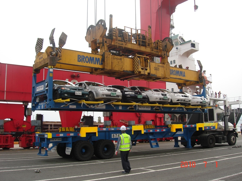 粵語: 公司韓進海運集裝箱航運現場